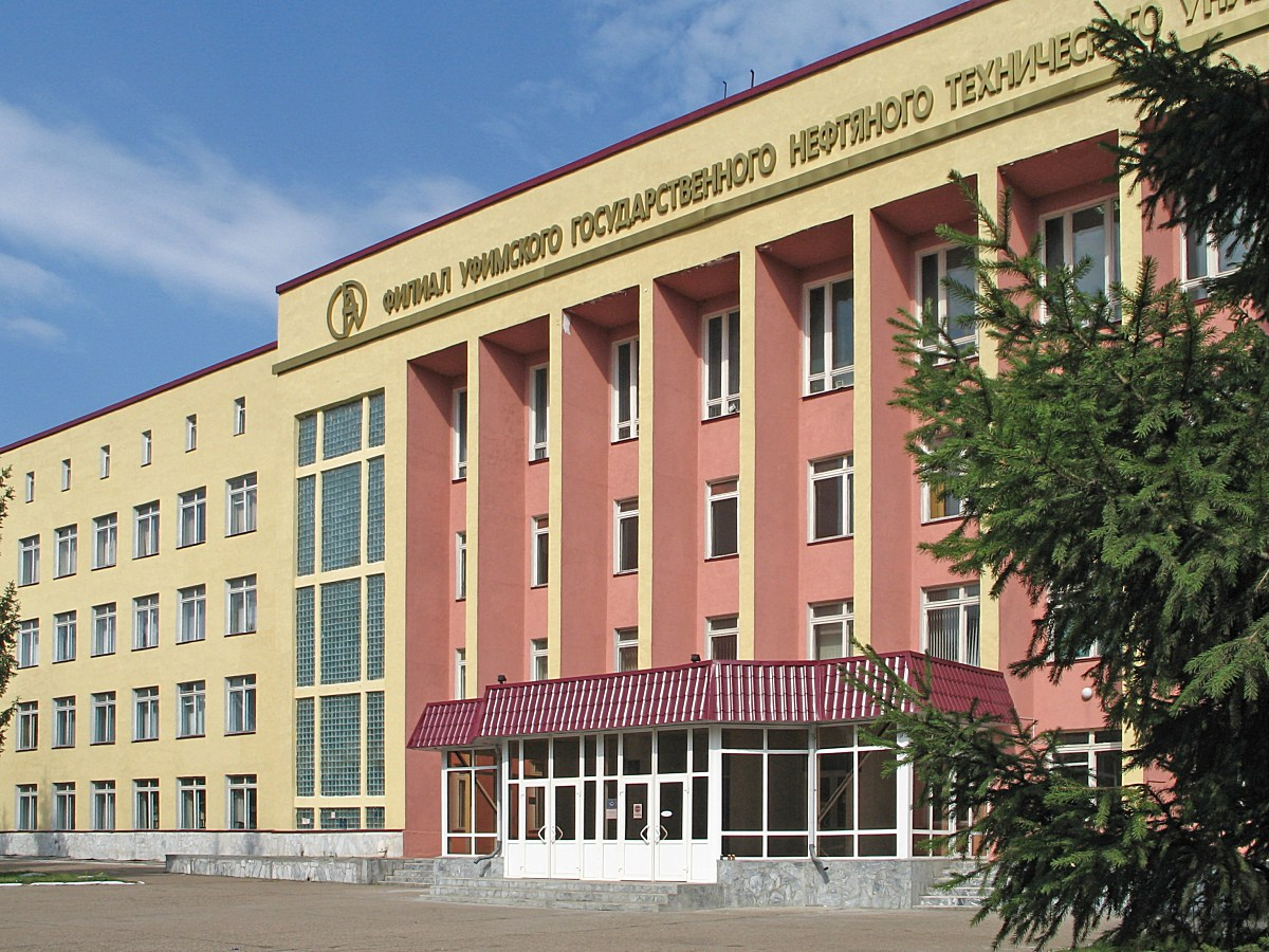 Стерлитамакский филиал УГНТУ